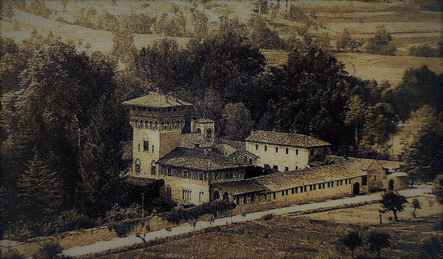 veduta del castello Centurione Scotto situato nel borgo di Millesimo-Savona